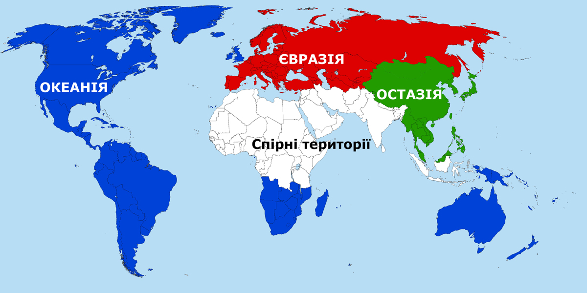 1984 (роман). Політична карта світу